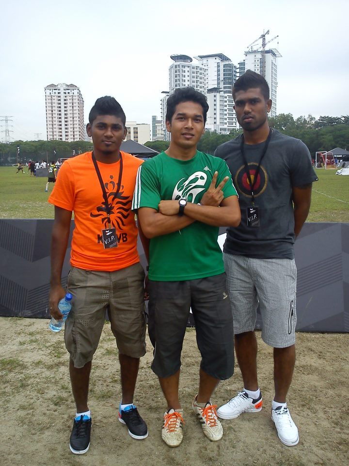 D.saarvindran,Thamil Arasu and me.